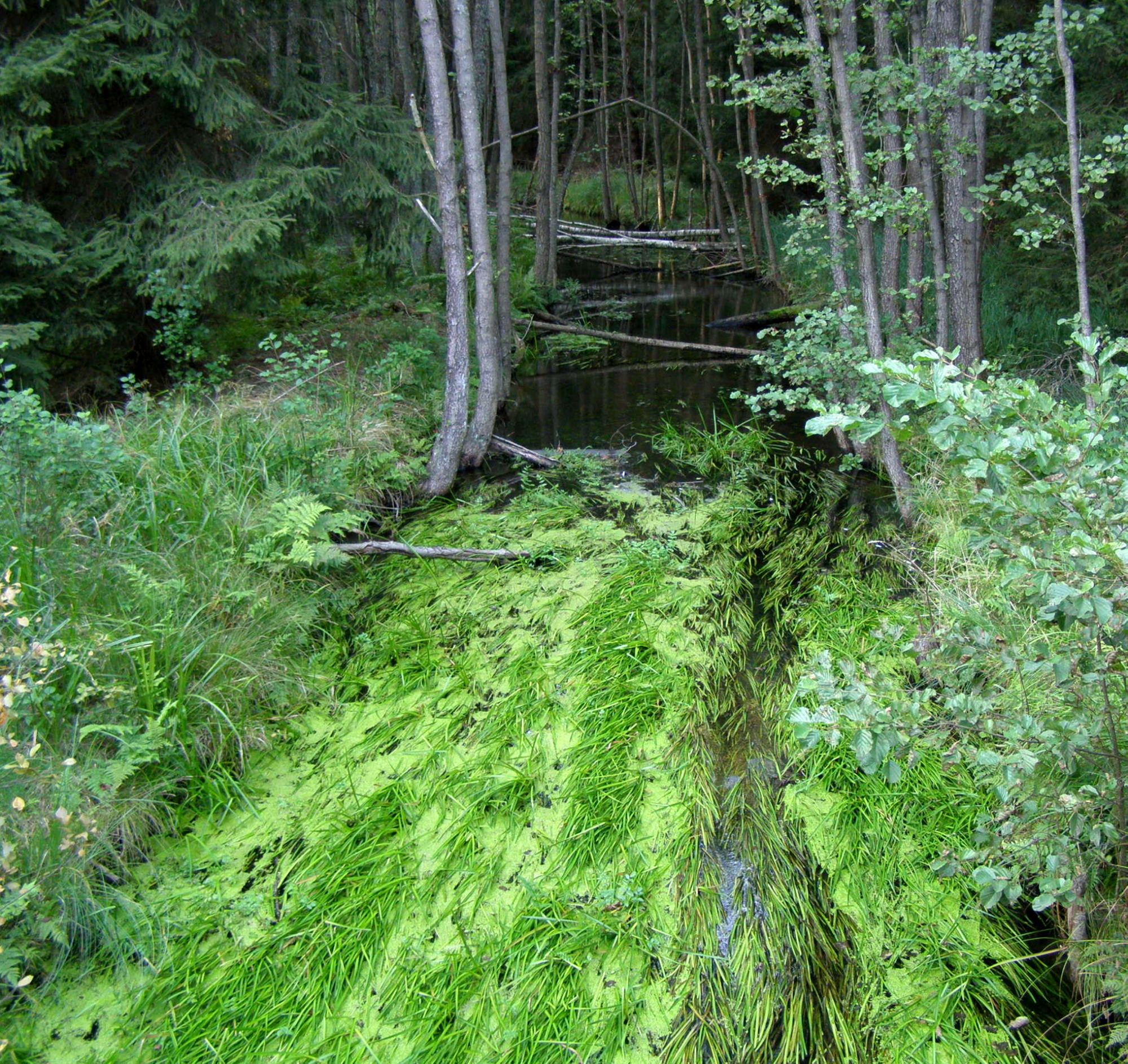 rzeczka Lipczynka